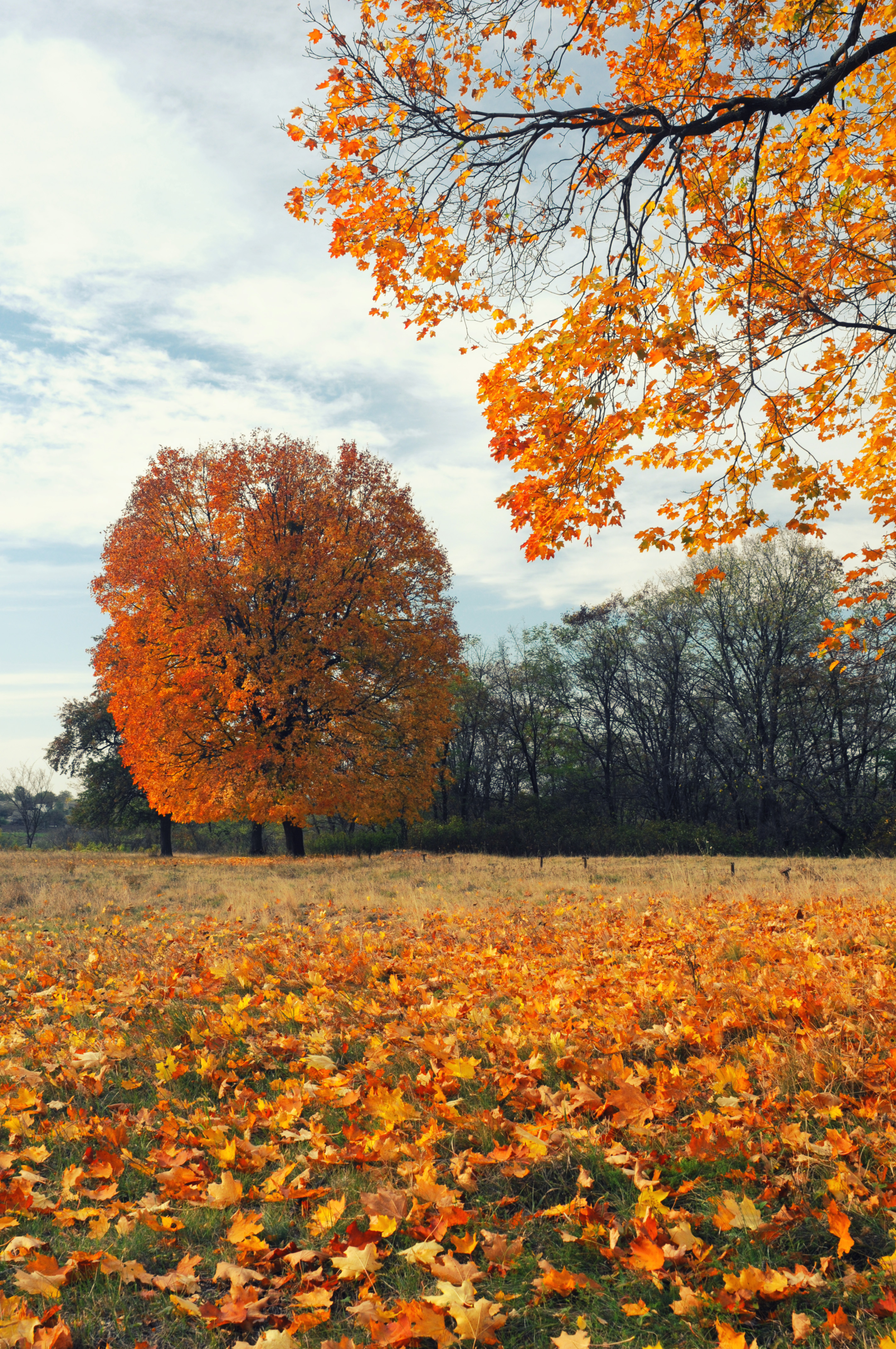 Руде село, парк садиби Залеського